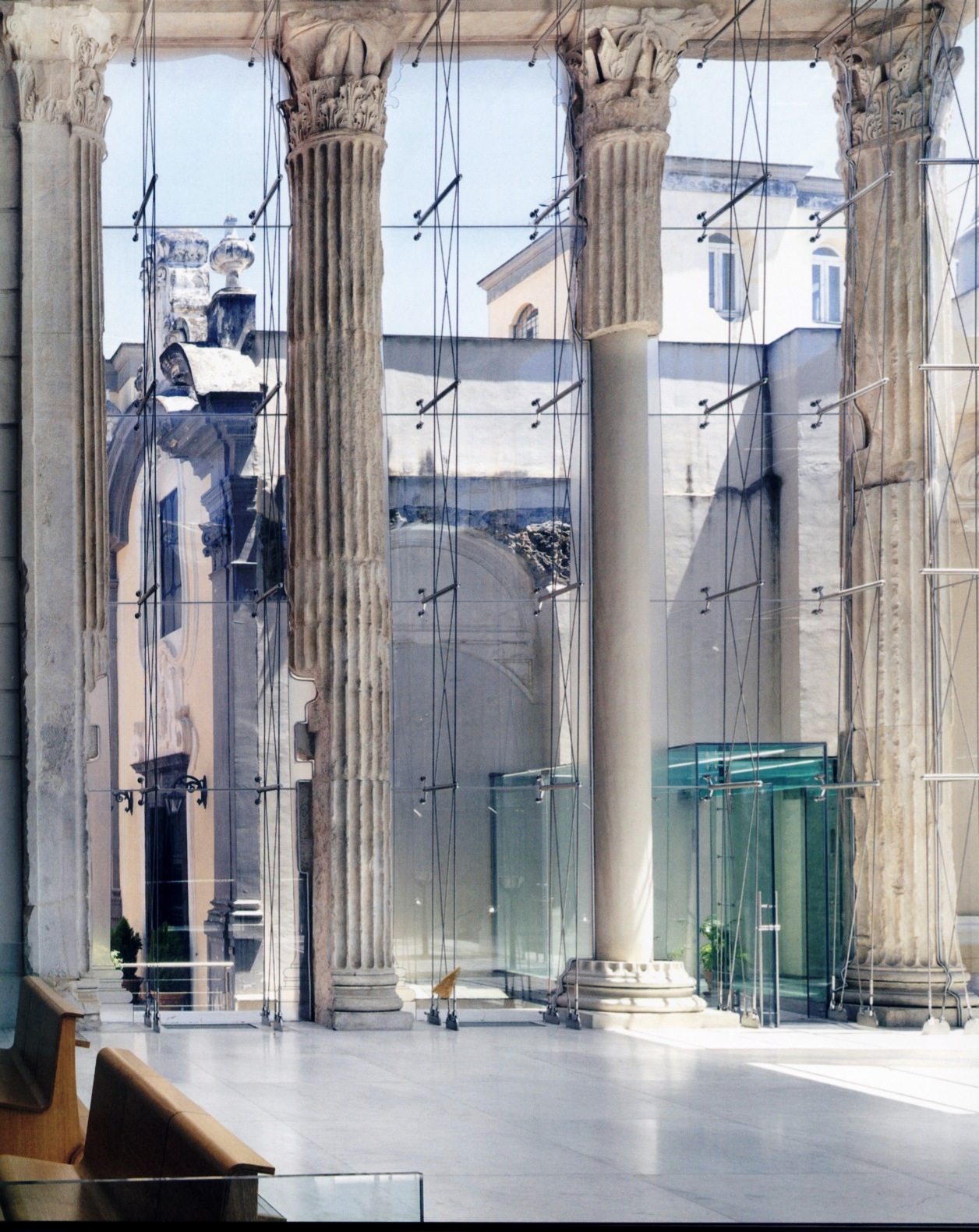 Tempio romano e Basilica Cattedrale di San Procolo martire di Pozzuoli